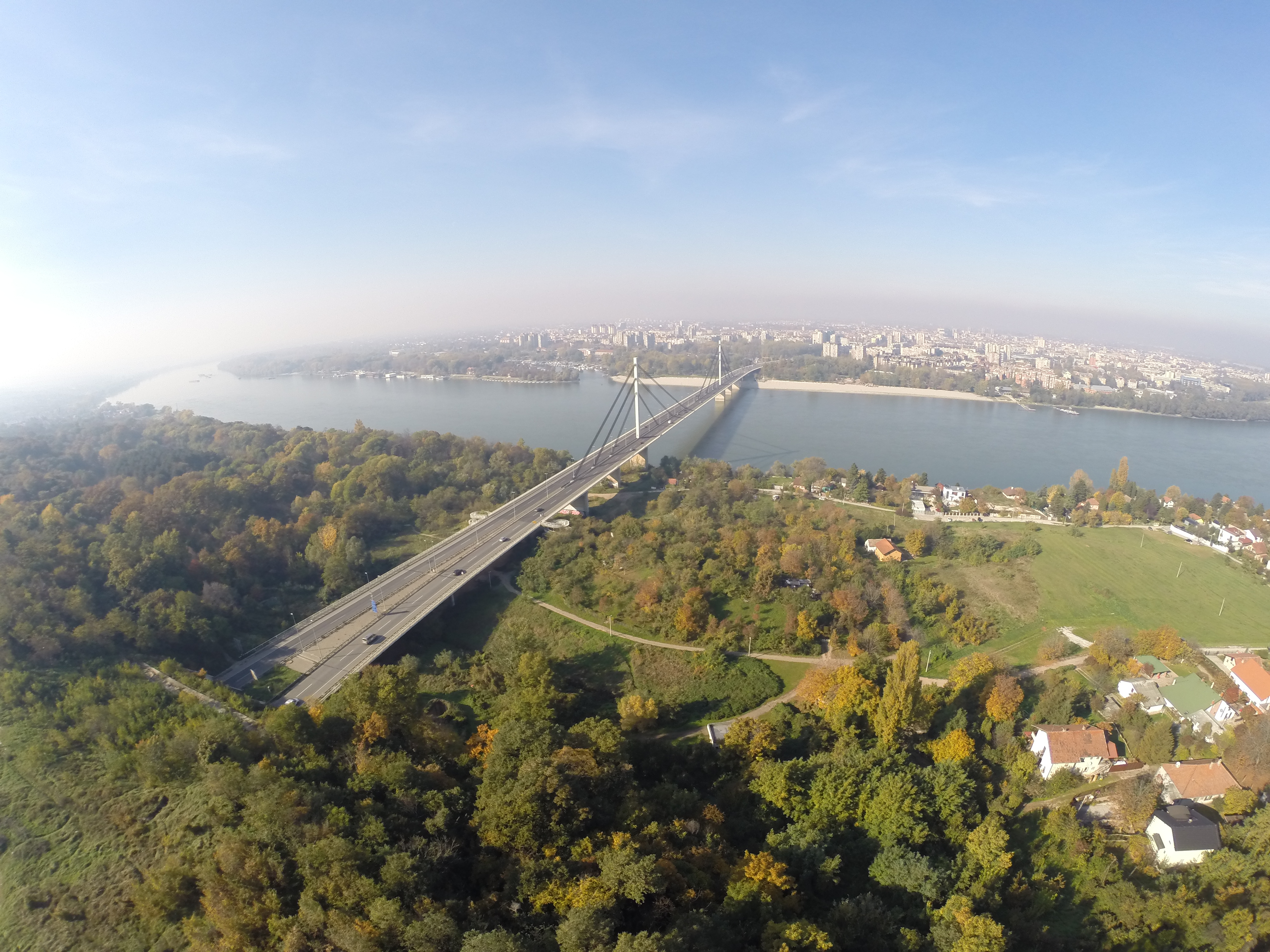 Most Slobode - Мост Слободе